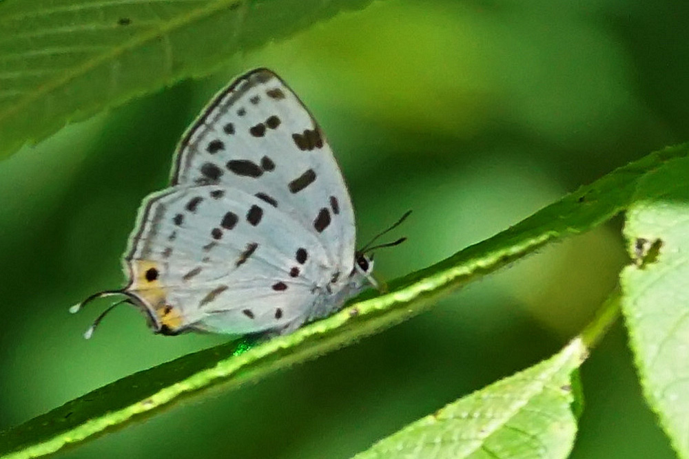 中文（台灣）: 墨點灰蝶 Araragi enthea morisonensis